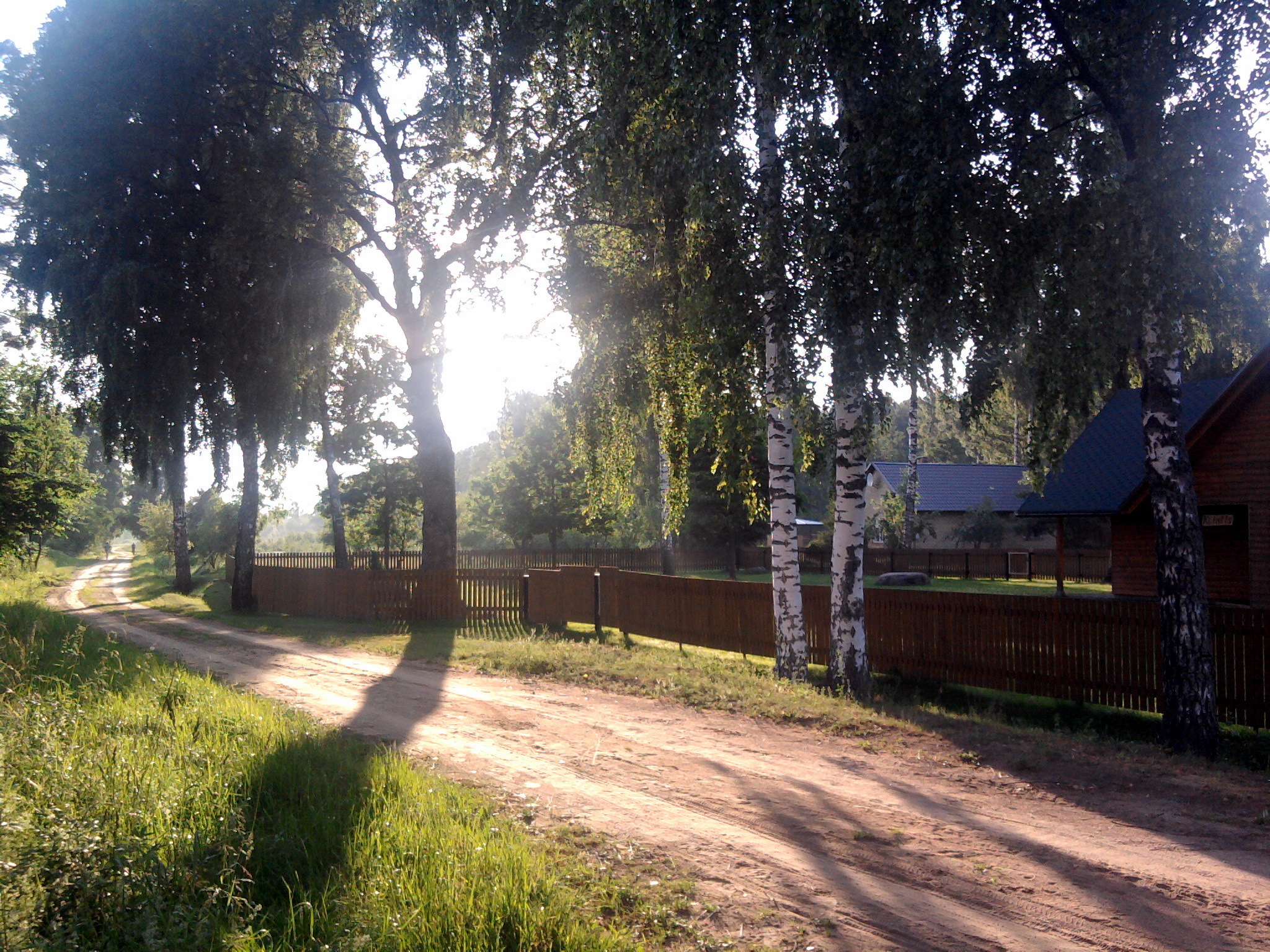 Vecais Tūjas ceļš